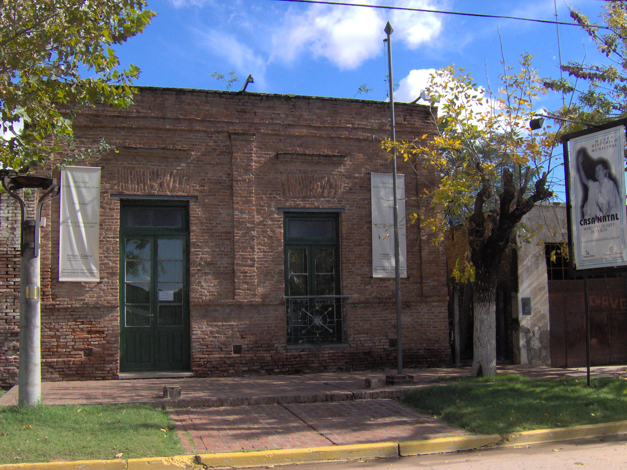 La casa donde Eva Perón vivió durante su niñez